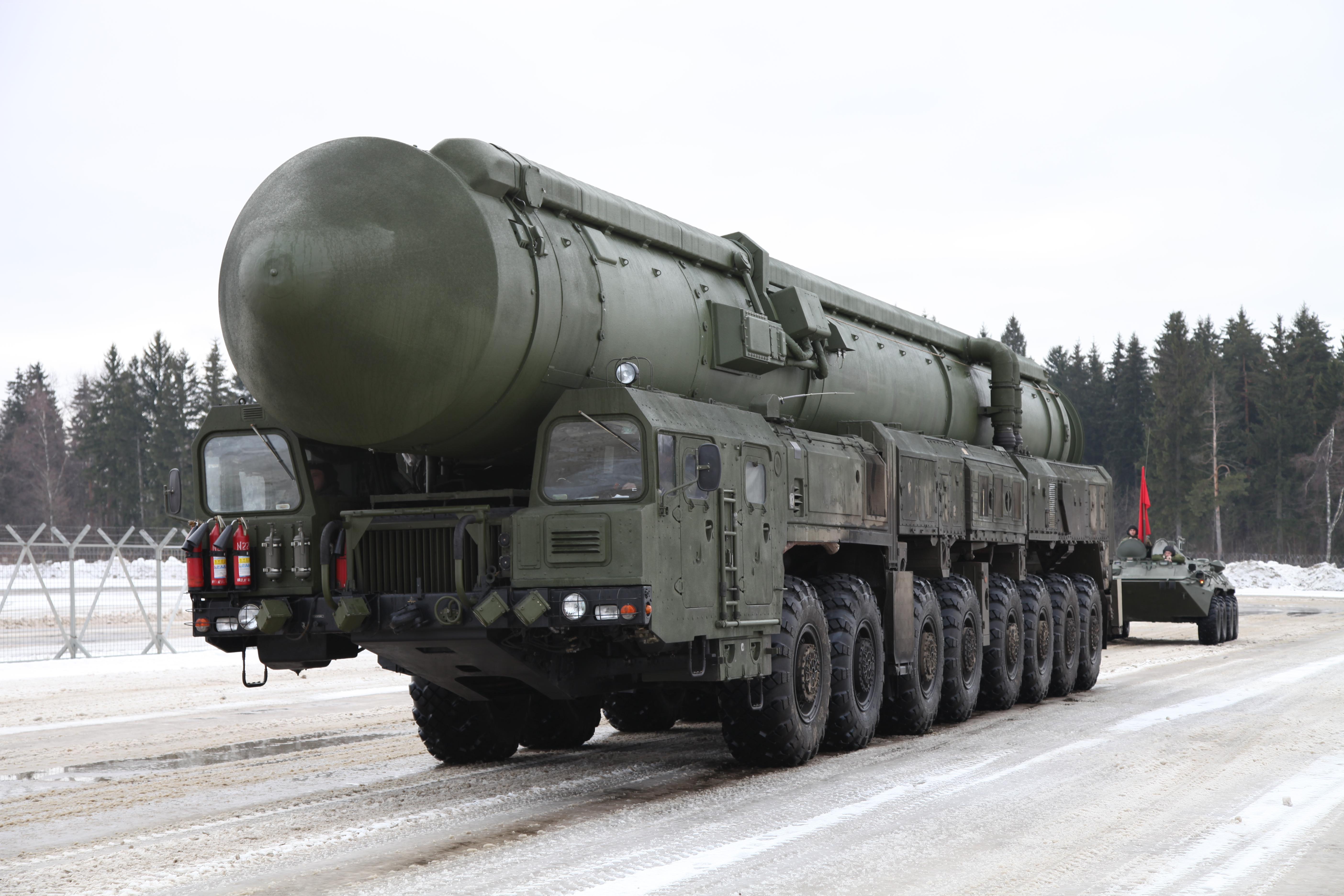 РТ-2ПМ2 Тополь-МTiếng Việt: RT-2PM2 «Topol-М»